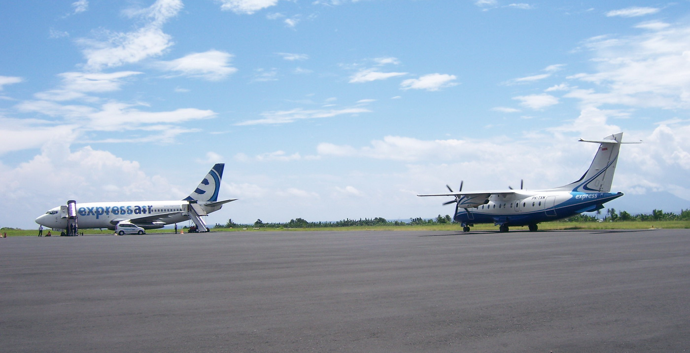 Bandara Sultan Babulah Ternate